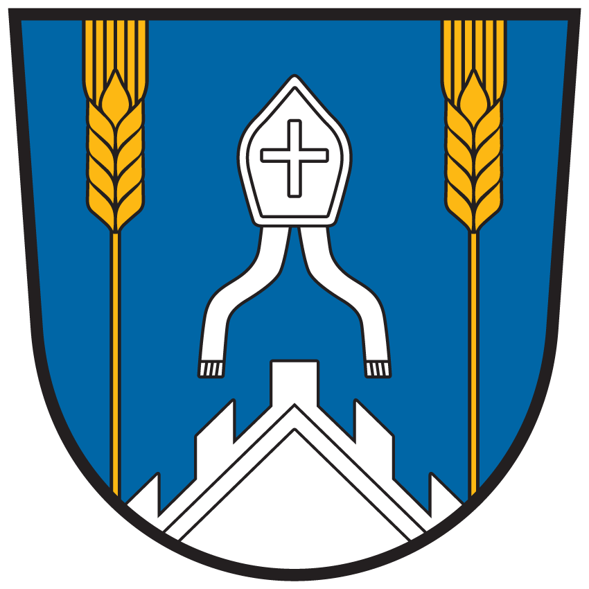 Wappen von Kappen am Krappfeld